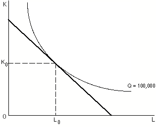 Isoquant